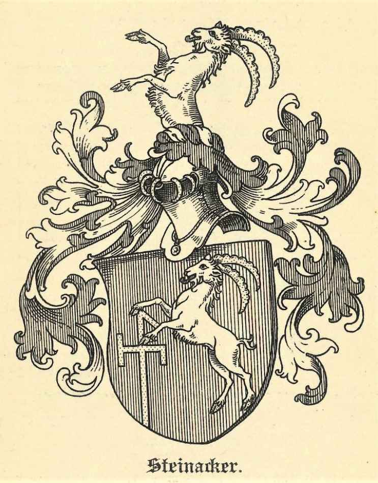 Wappen der bürgerlichen Familie Steinacker, ursprünglich aus Quedlinburg, Deutsches Geschlechterbuch Dresden 1918